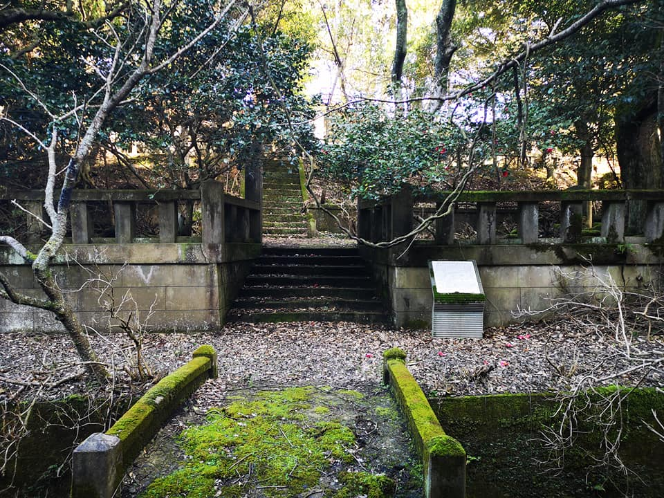 京丹後市網野町磯にある溝尻房蔵の顕彰地・光潤乃杜